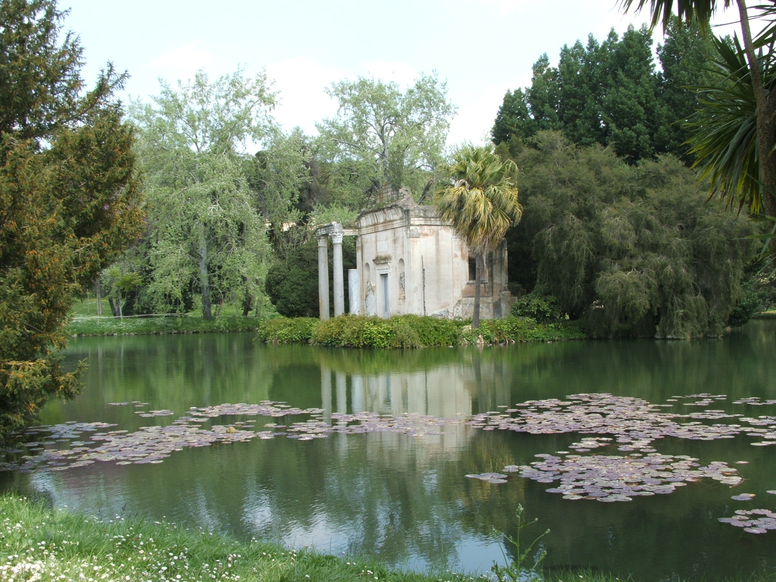 Immagine dalla Reggia di Caserta, Caserta, Campania, Italia. Il giardino inglese di Maria Carolina